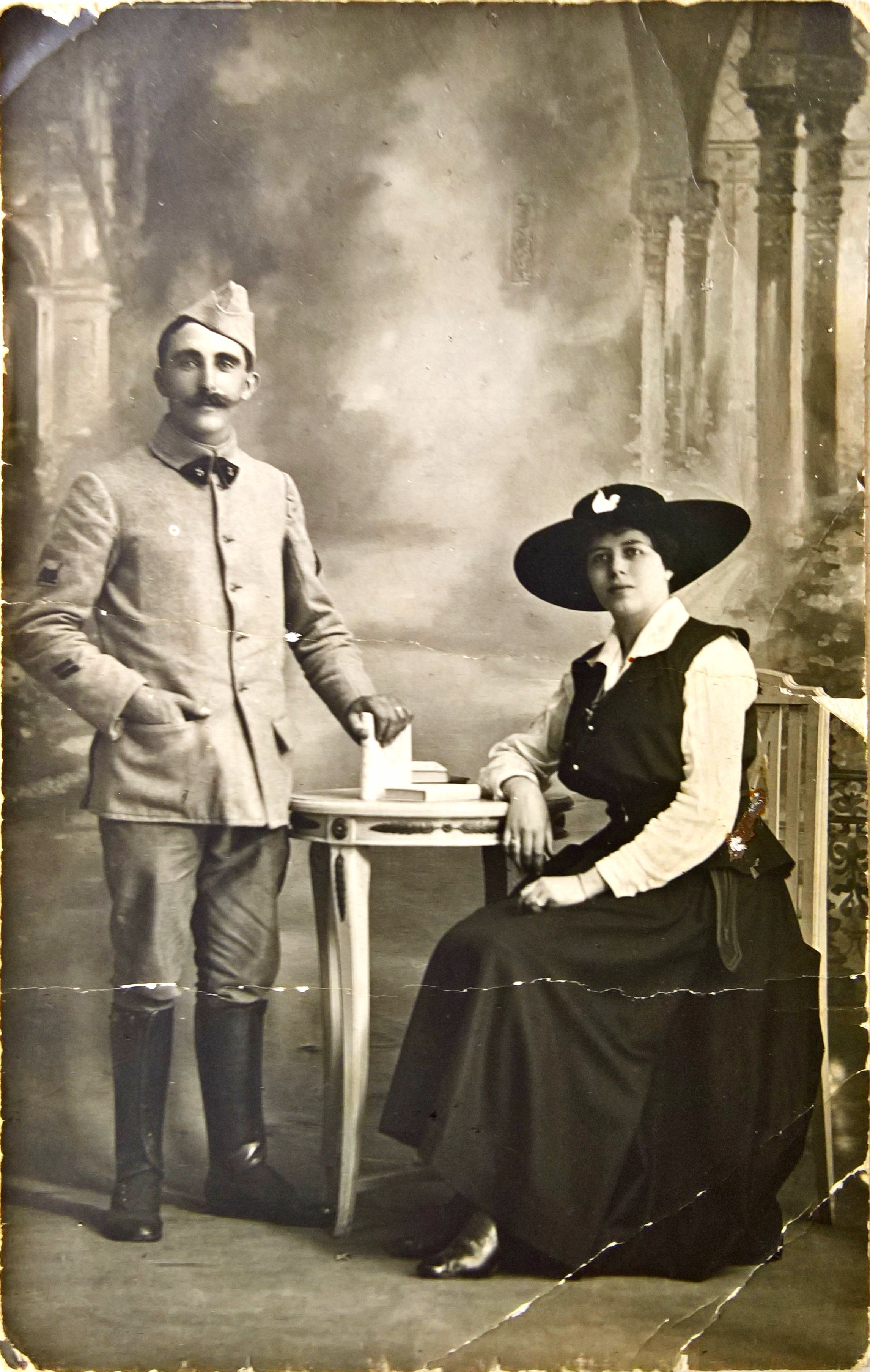 Photo de Pierre Billard et Marcelle Ancelet